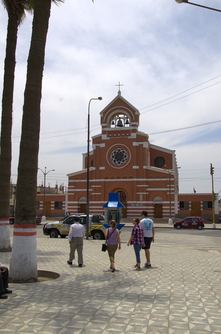 fragmento de la plaza de Armas de Chincha Alta con la vista de la Iglesia Santo Domingo de Guzmán al fondo. Verano 2014